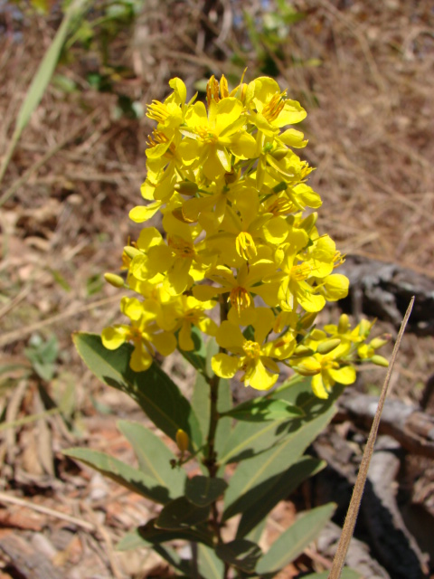 Ouratea floribunda (A.St.-Hil.) Engl. - OCHNACEAE - Parque Olhos D'Água - Brasília - Distrito Federal - Brasil.